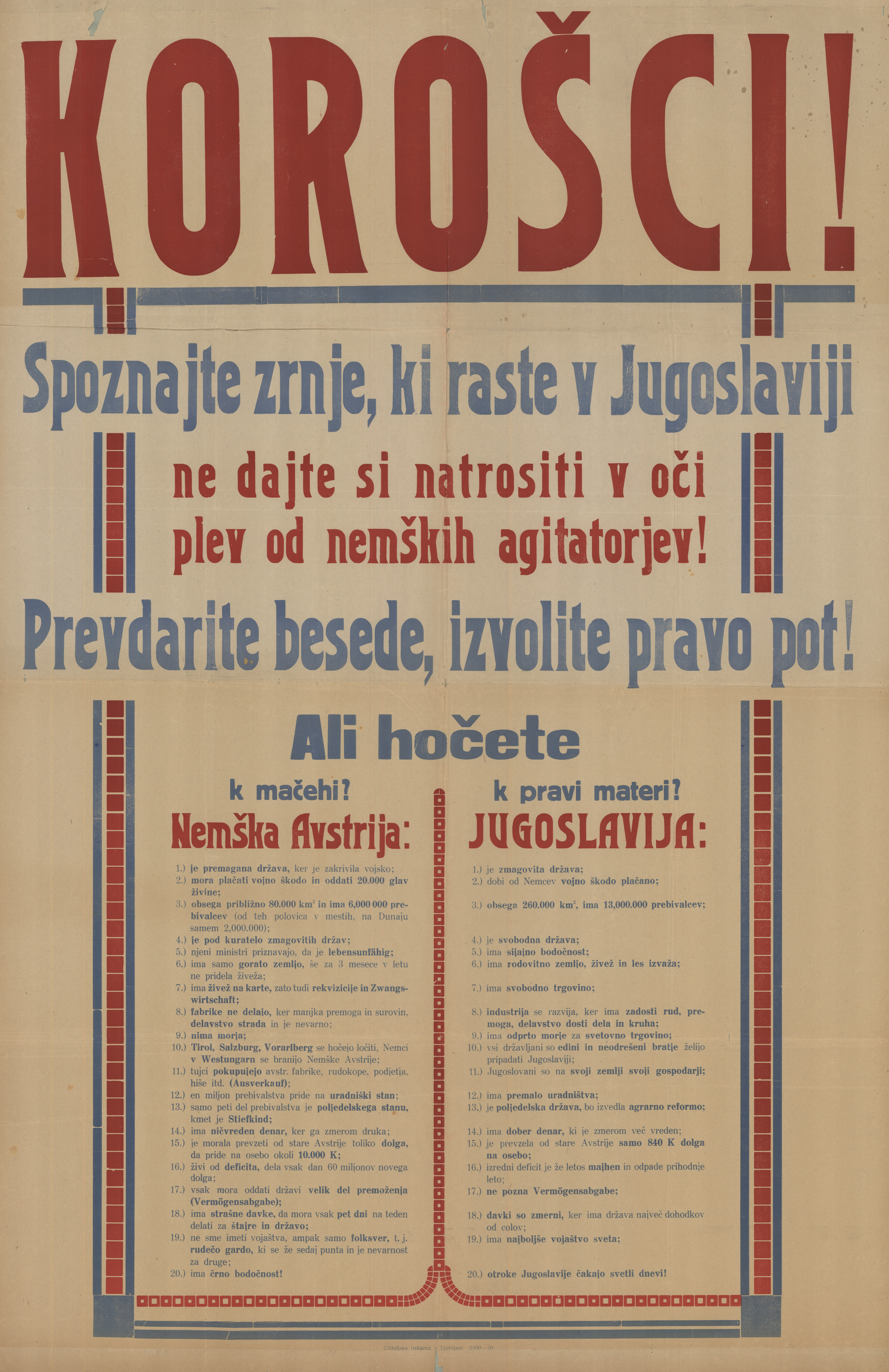 Plakat ob plebiscitu Plakat ob plebiscitu Korošci, spoznajte zrnje, ki raste v Jugoslaviji